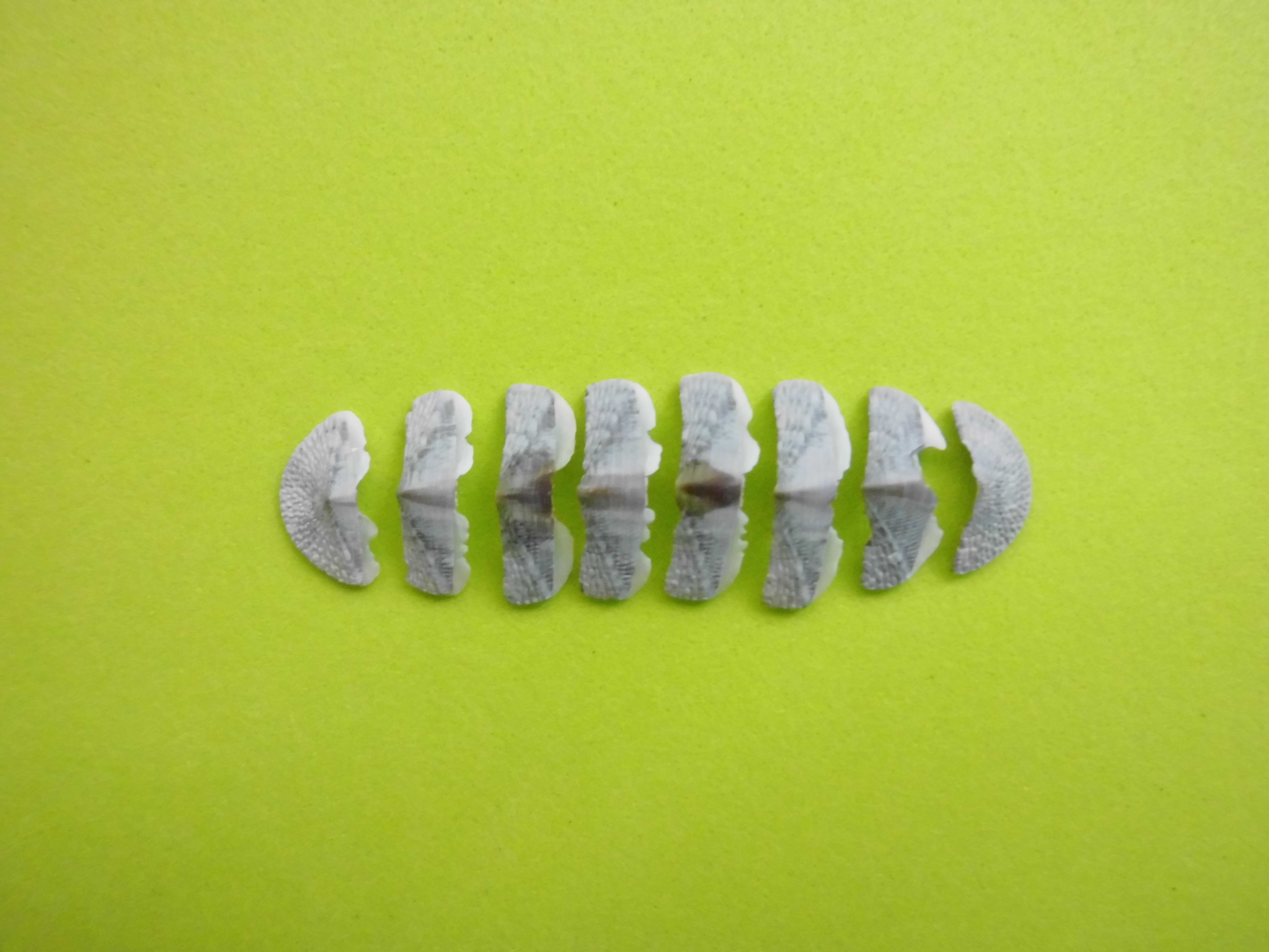 Chiton (Chiton) marmoratus Gmelin, 1791 (placas) colectado en 1963 en el Archipiélago Los Monjes, Dependencias Federales - Venezuela